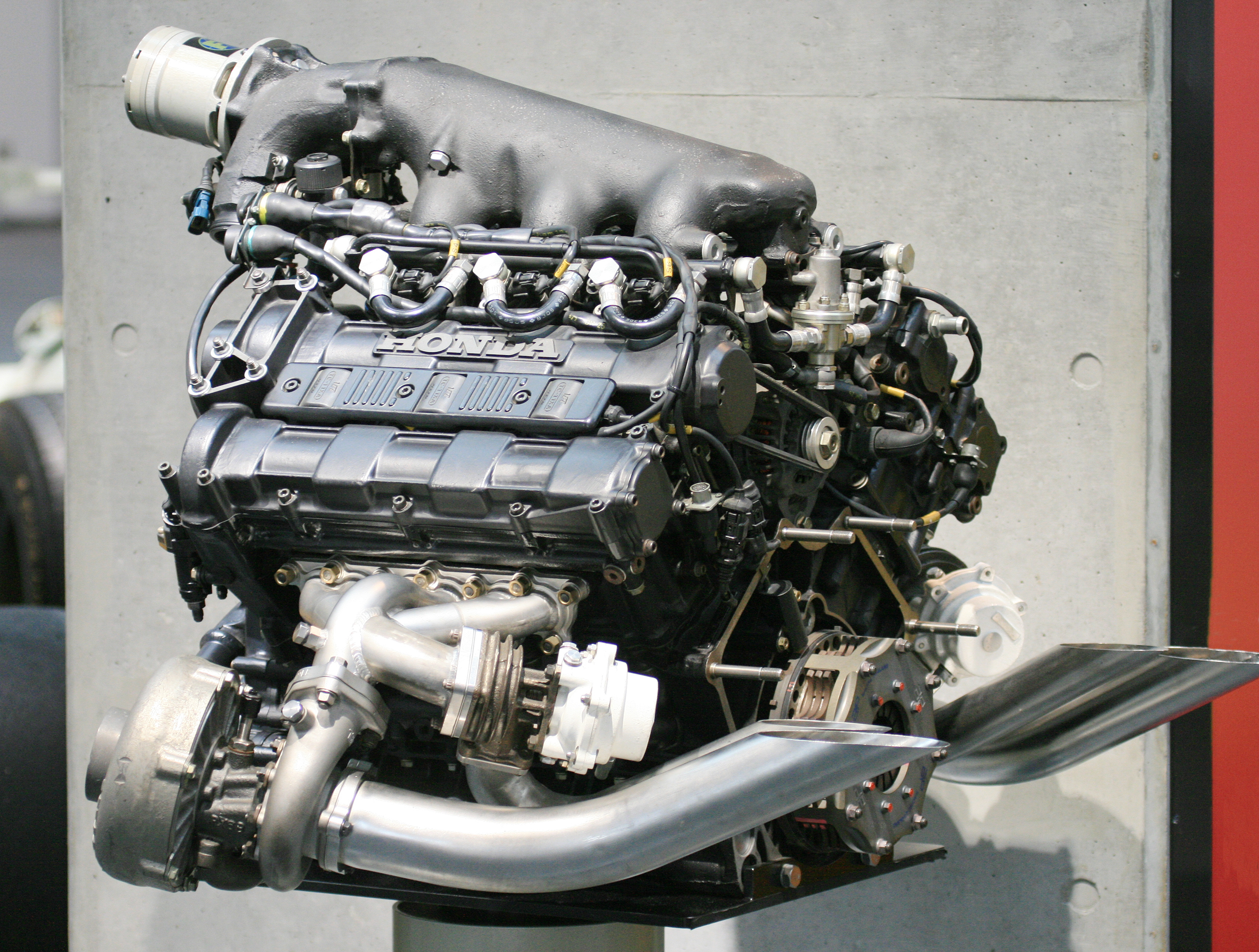 1988 Honda RA168E turbo engine